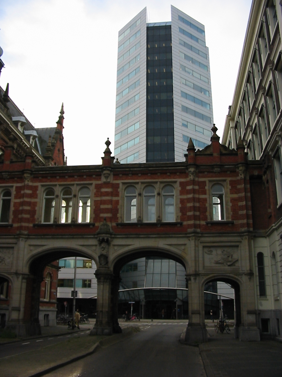 Zelfgemaakte foto. Op de achtergrond het hoofdkantoor van de Nederlandse Spoorwegen, ofwel HGB IV. Op de voorgrond links HGB II, rechts HGB I en ertussenin de loopbrug.